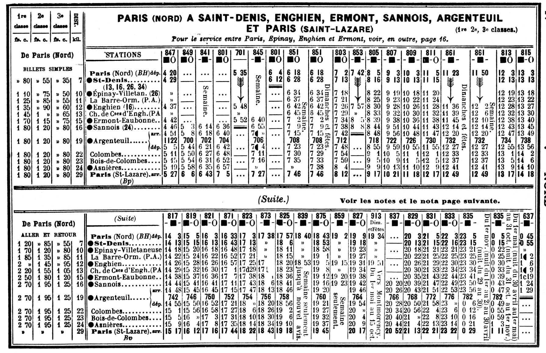 Tableau horaire de la ligne Gare du Nord - Saint-Denis - Enghien - Ermont - Sannois - Argenteuil - Saint-Lazare